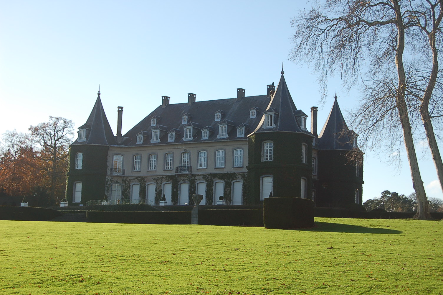 Chateau de La Hulpe Walon: Tchestea d' l' Elpe